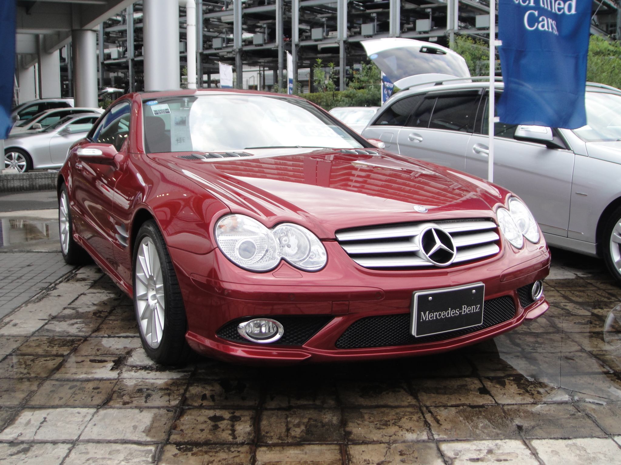 メルセデス・ベンツ SL550 AMG スポーツパッケージ